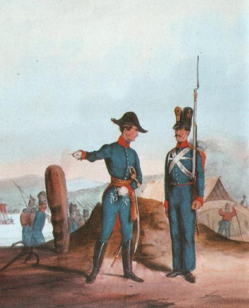 österreichisch-ungarische Czakisten-Infanterie Mitte des 19.Jahrhunderts